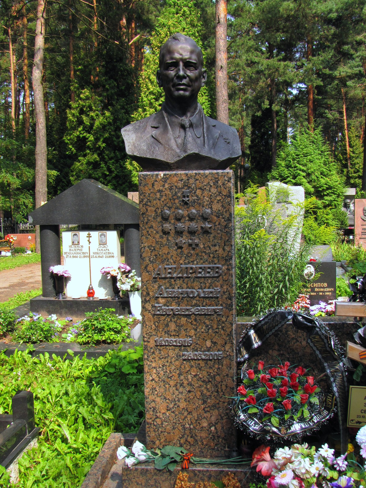 Надгробный памятник Героя Социалистического Труда Анатолия Евгеньевича Андреева на Восточном кладбище в Минске.